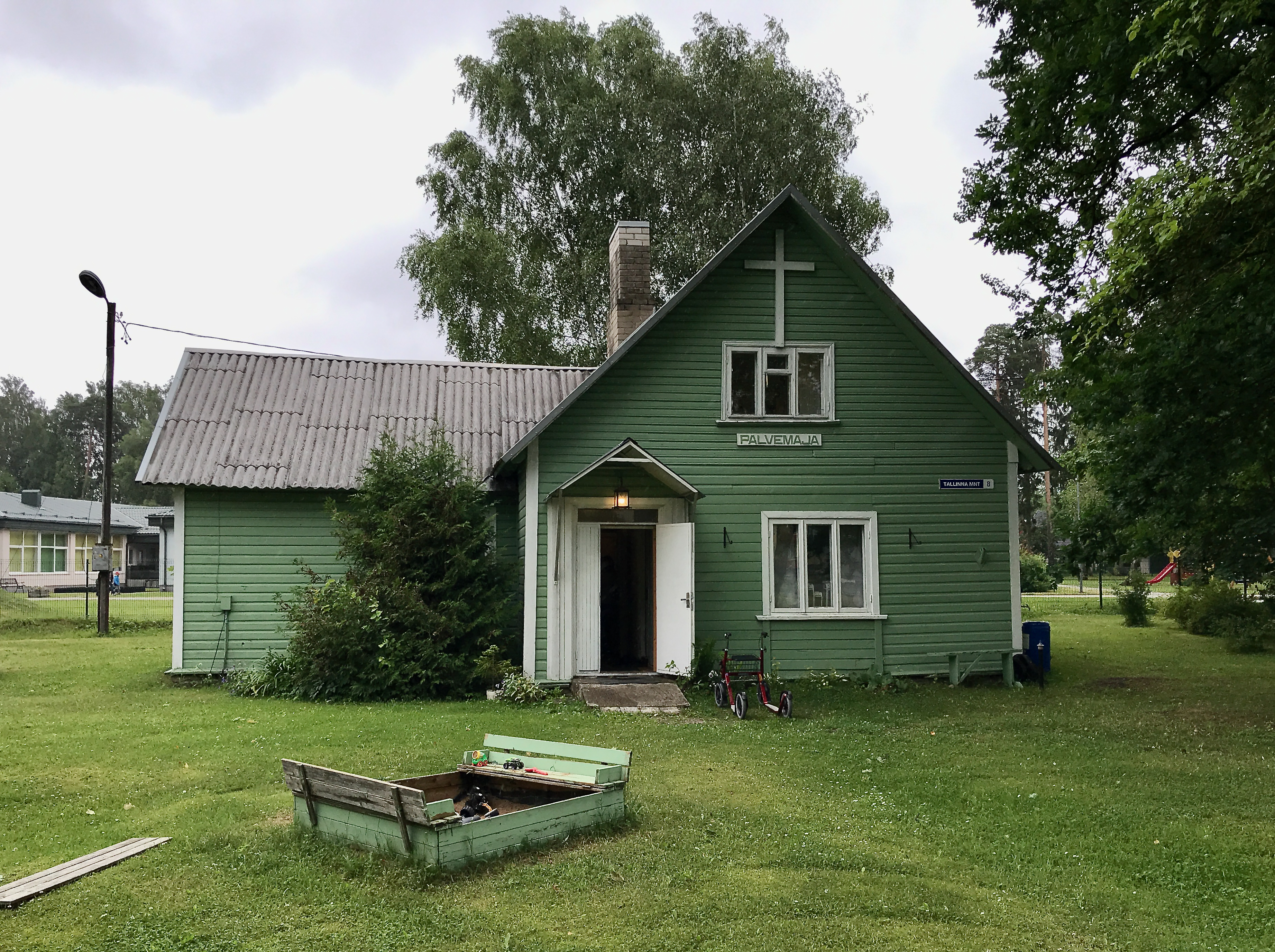 Saku vennastekoguduse palvemaja